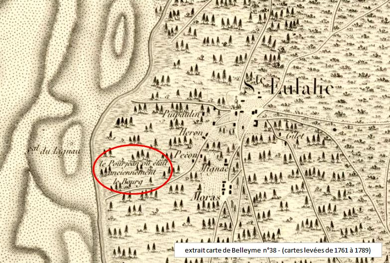 "Le Pourjean où était anciennement le bourg"